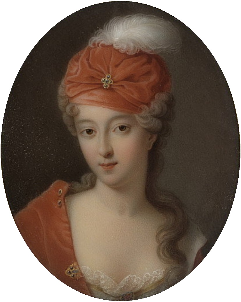 Portrait of Francoise-Marie de Bourbon (1677-1749)